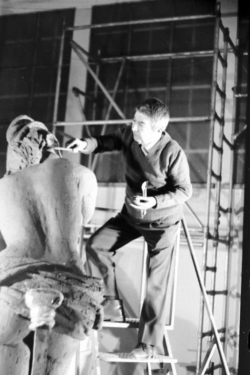 Artista al lavoro